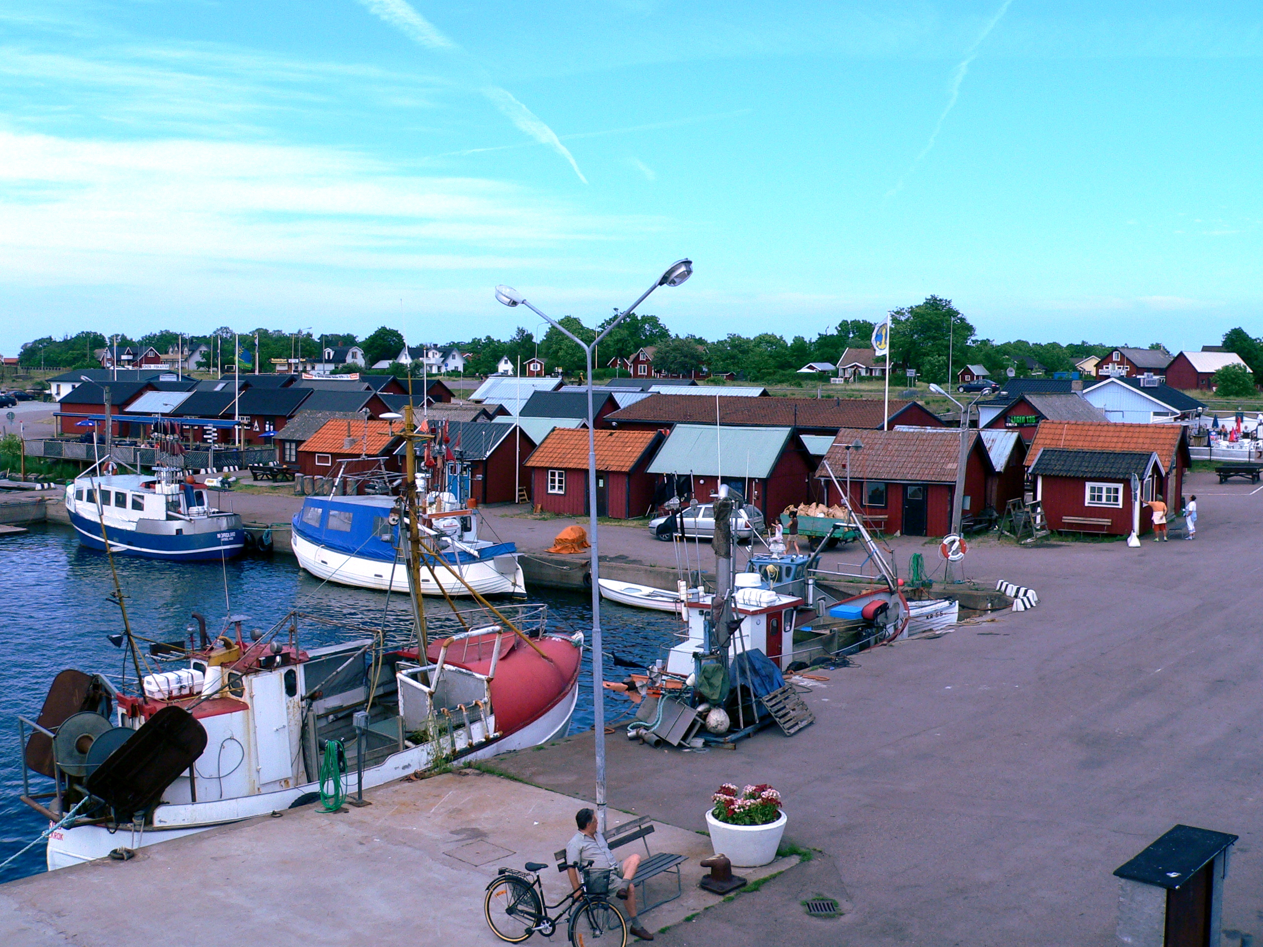 En bild av Byxelkroks hamn tagen från en färja